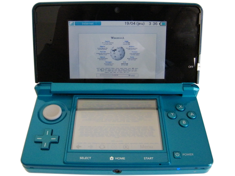 Photo du navigateur web de la Nintendo 3DS sur la page d’accueil de Wikipedia.